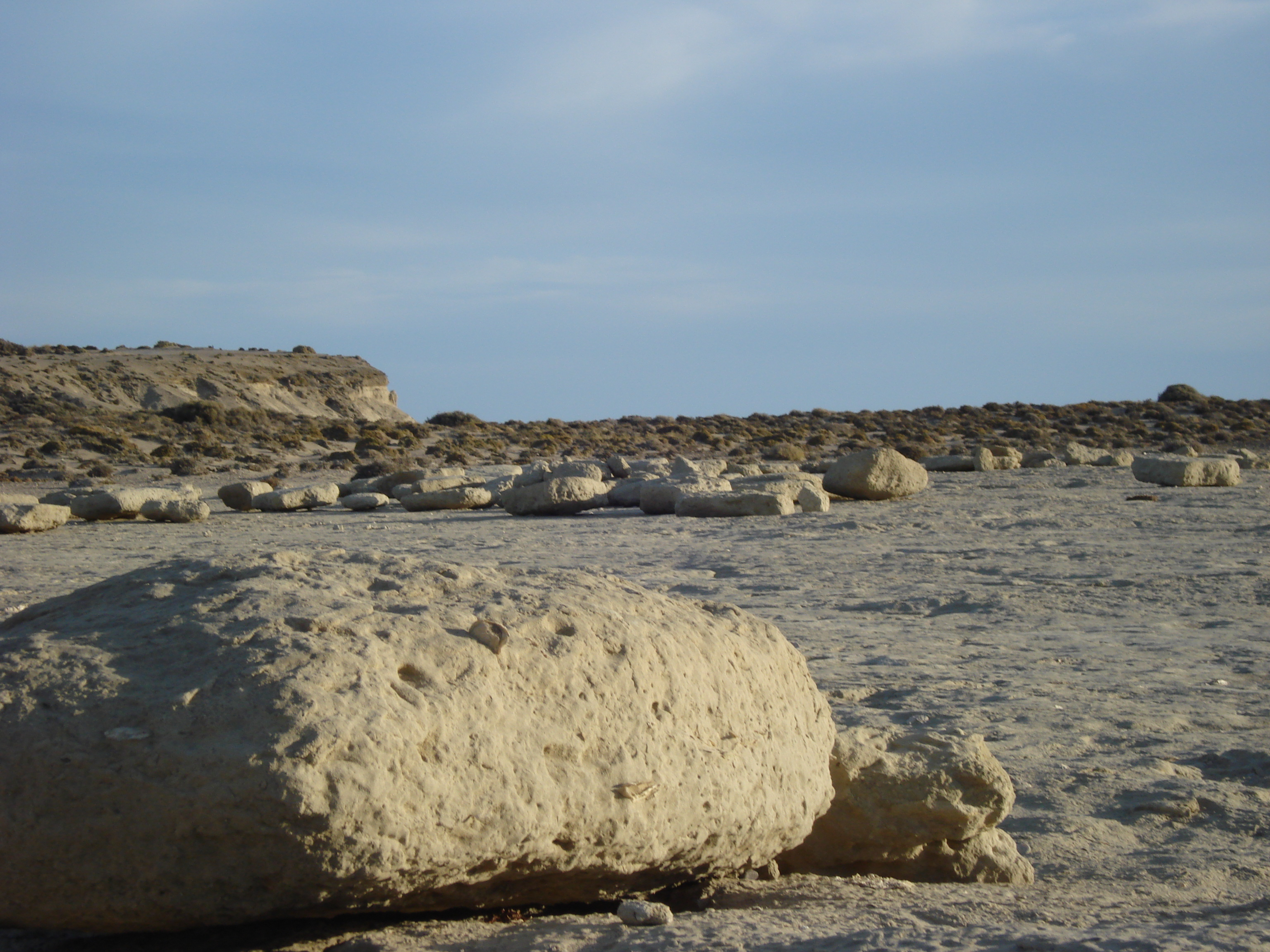 Rocas en la playa de punta Pardelas, península Valdéz.